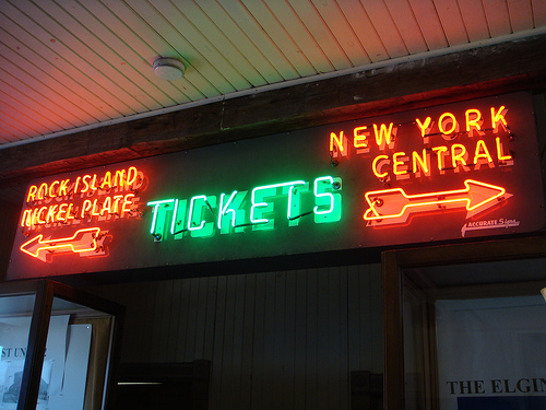 Photo prise de la salle des guichets de La Salle Street Station